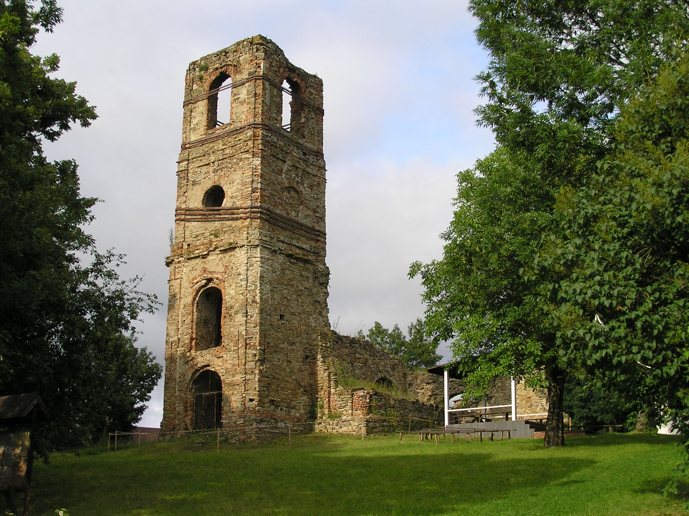 Baziliánsky Monastier Zoslania Svätého Ducha, Krásny Brod, júl 2008